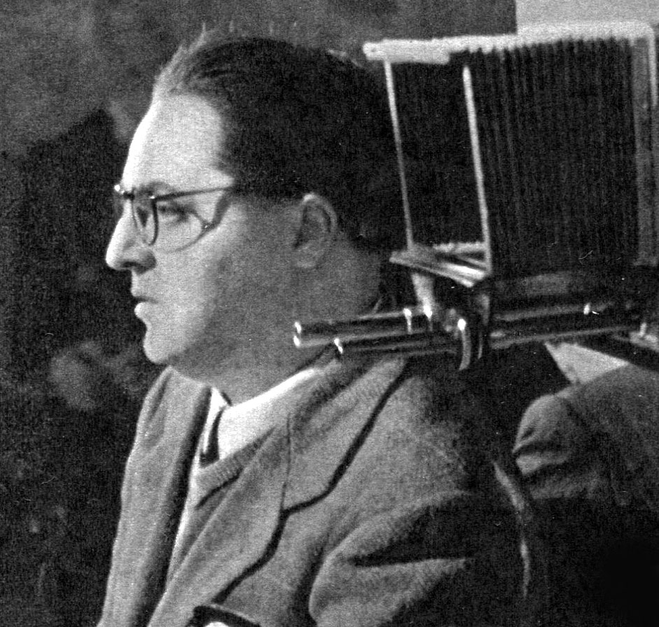 Il regista Raffaello Matarazzo in un'immagine del 1942